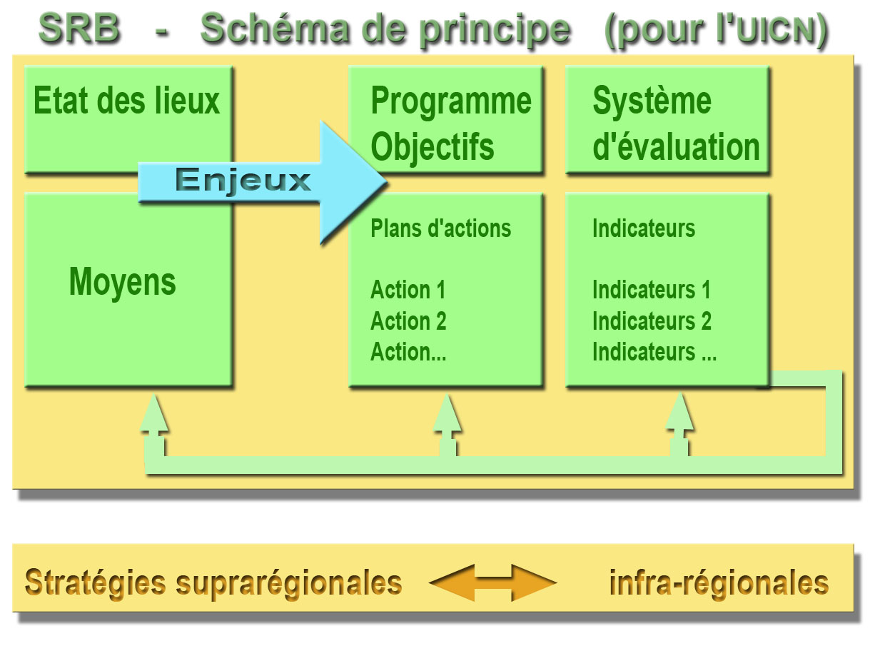 éléments de base d'une SRB (stratégie régionale de biodiversité) pour l'UICN, sur la base de travaux faits avec des collectivités, parcs naturels régionaux et divers acteurs impliqués dans la gestion et protection de la biodiversité (ex : UICN, Page internet intitulée Quelle implication des collectivités territoriales pour la biodiversité ? consultée 2010/11/26/)